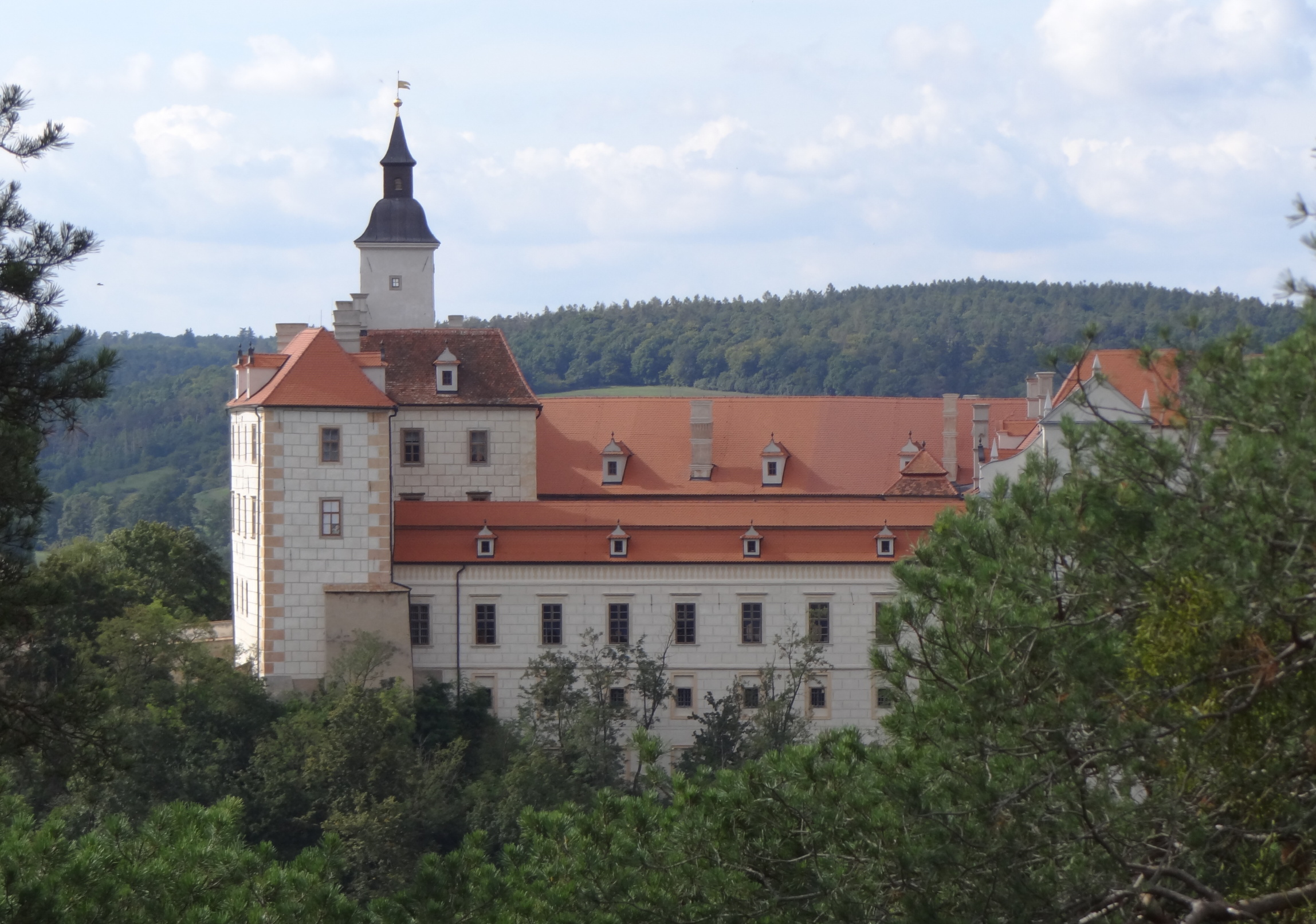 Starý zámek Jevišovice, Jevišovice 1, v obci na ostrožně, Jevišovice.